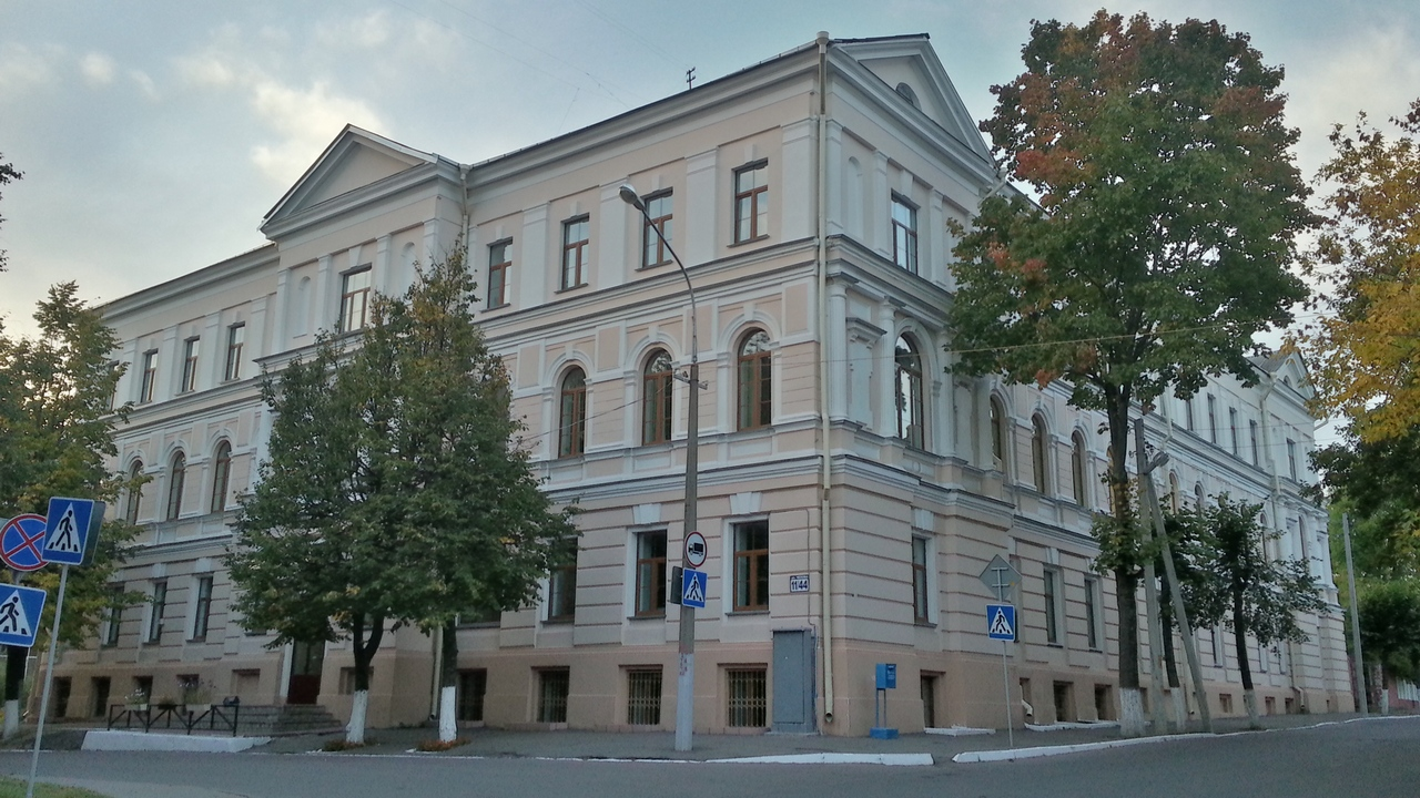 Беларуская (тарашкевіца): Будынак былой мужчынскай духоўнай вучэльні. г. Віцебск This is a photo of Belarusian heritage monument. Reference number: 213Г000084 ( WLM)